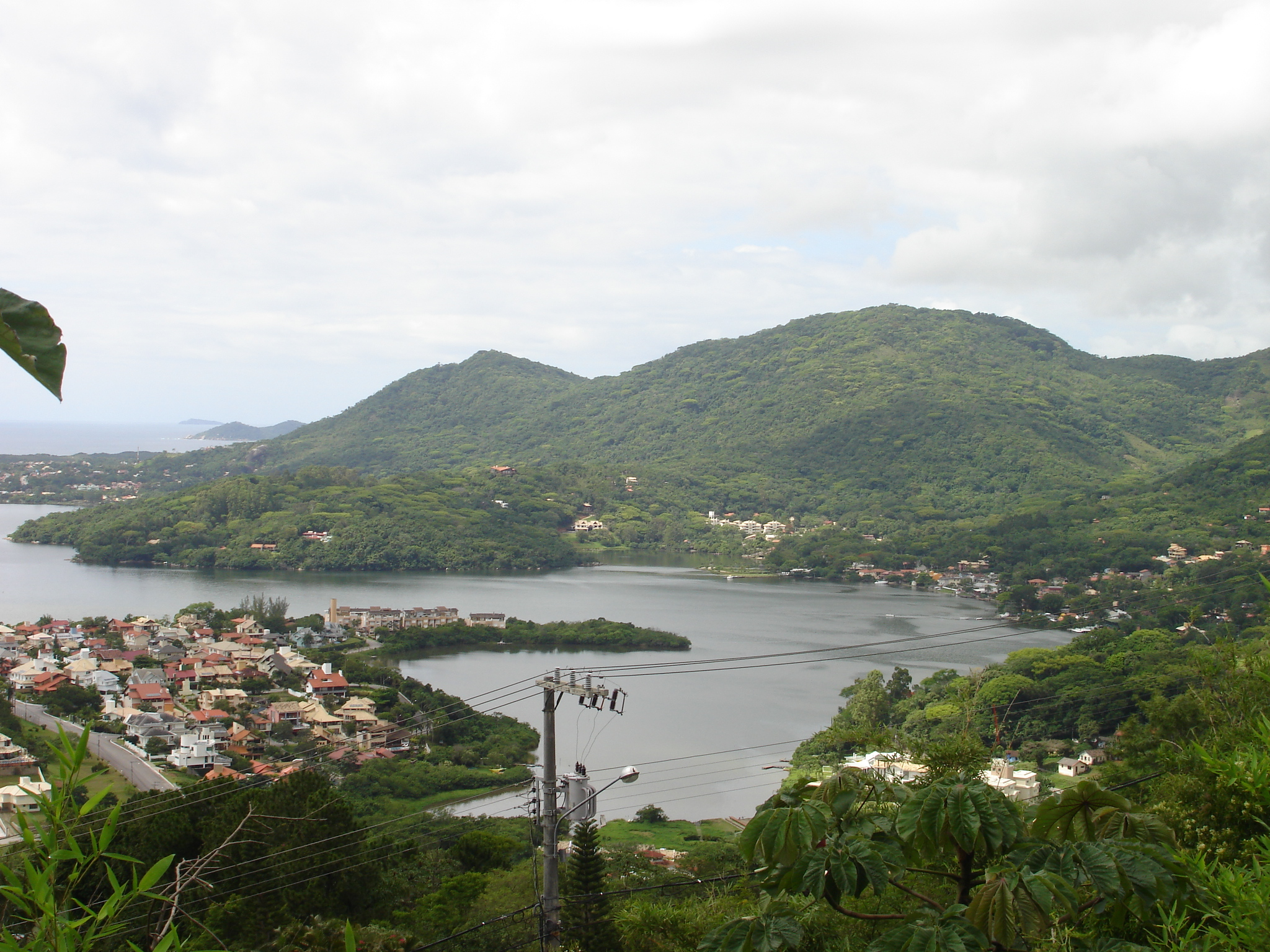 Florianópolis city, Santa Catarina state, Brazil. Canto da Lagoa da Conceição, Morro do Badejo, by Herbert Vieira, january 2006